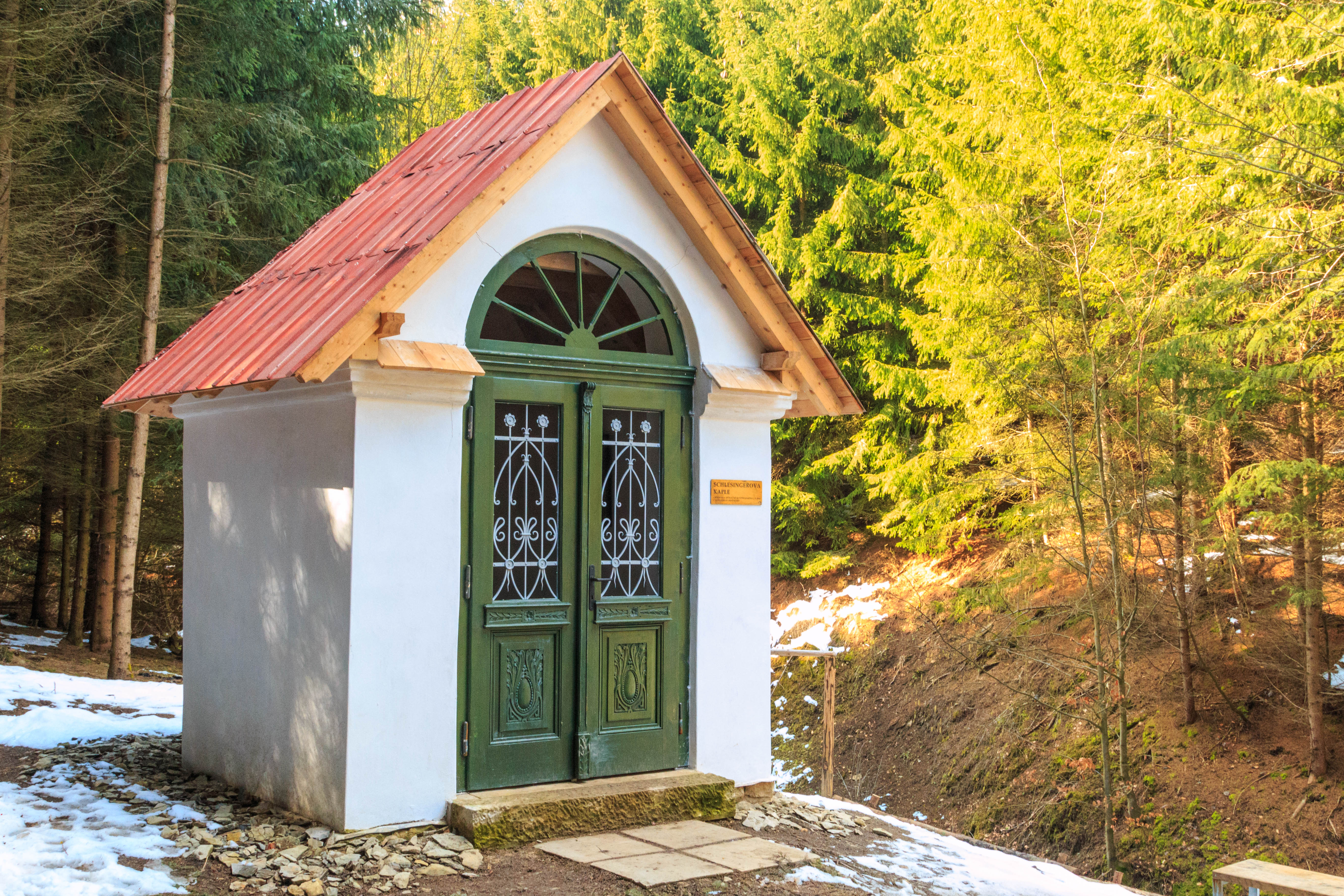 Schlesingerova kaple Project: Chráněná území.